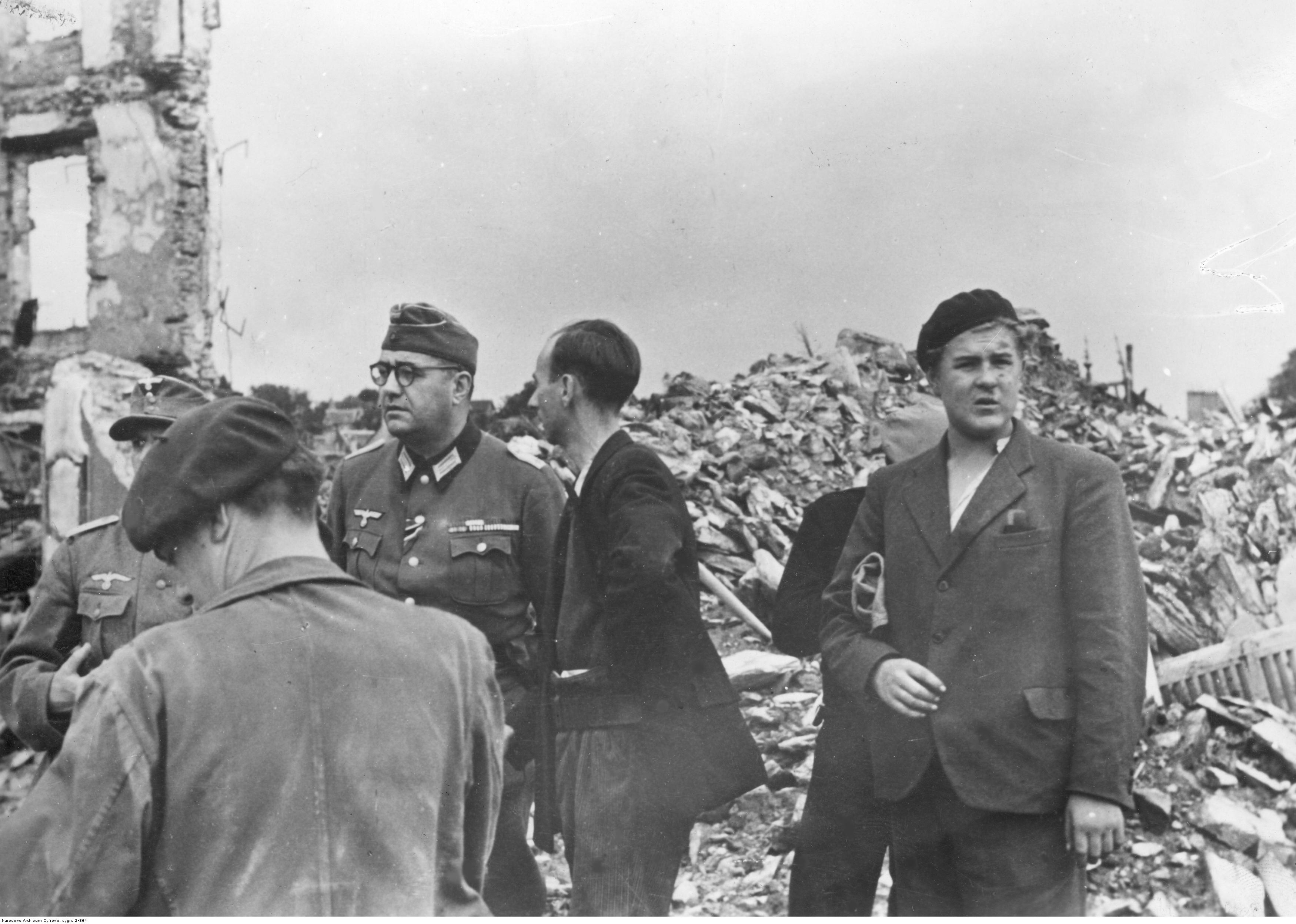 Francuski faszysta Jacques Doriot (w okularach) w rozmowie z mieszkańcami miejscowości St. Lo zbombardowanej przez lotnictwo alianckie.